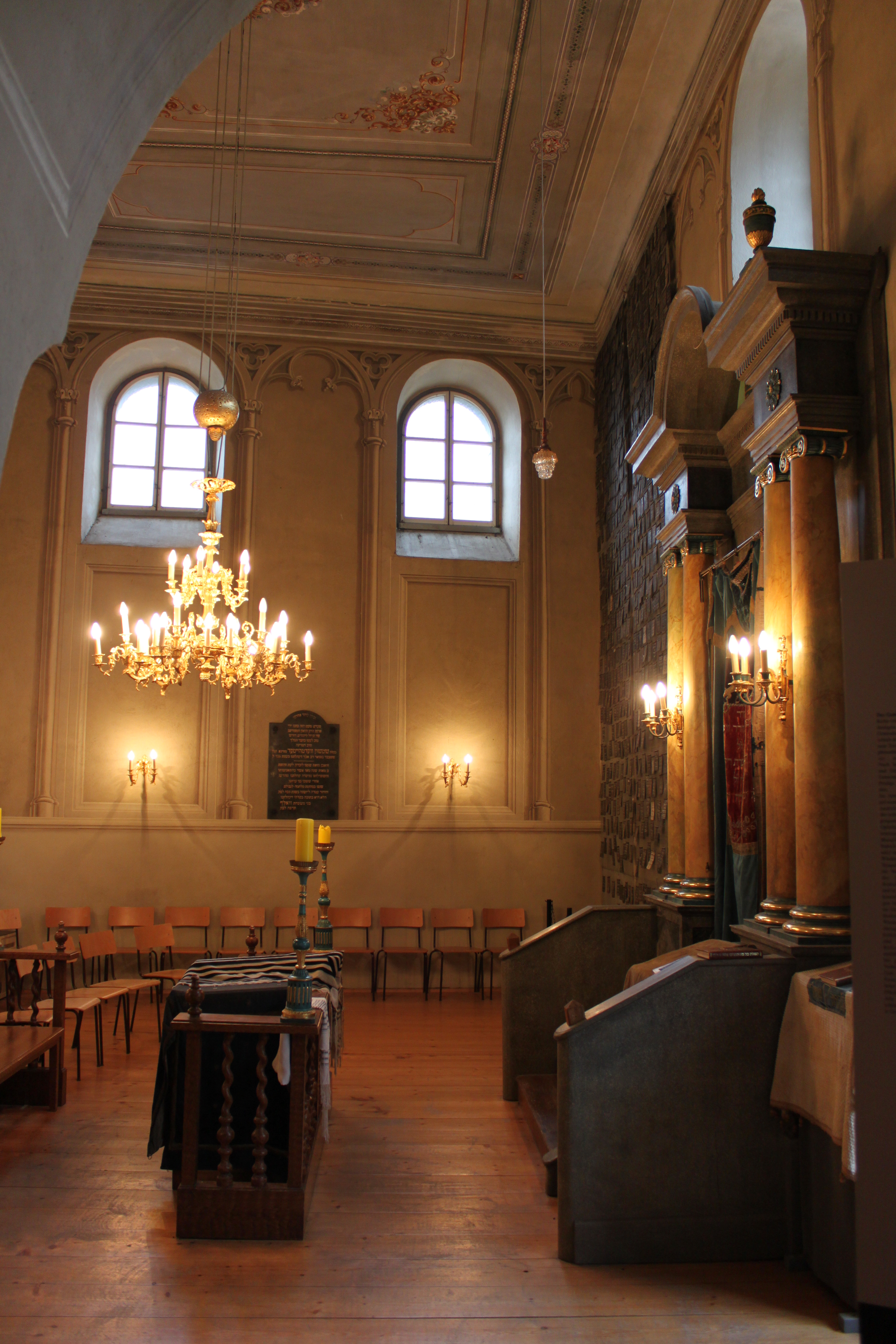 Synagoge, Jüdisches Museum, Wertheimerhaus